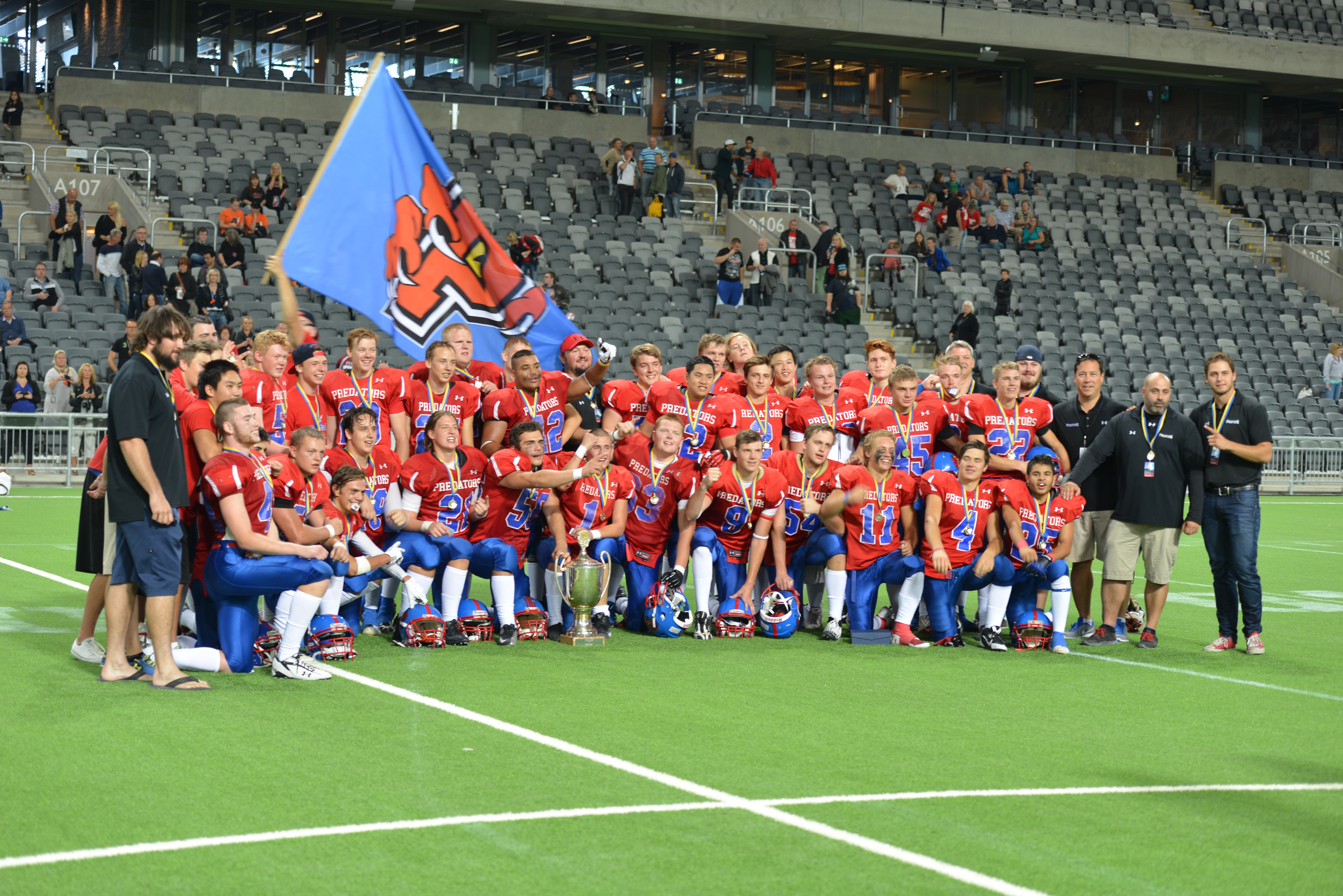 U19 SM-final i amerikansk fotboll mellan Tyresö och Kristianstad. Kristianstad blev svenska mästare efter att ha vunnit matchen med 54-28.